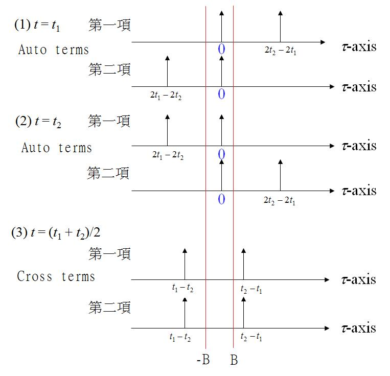 Windowed Wigner Distribution Function with mask function ideal